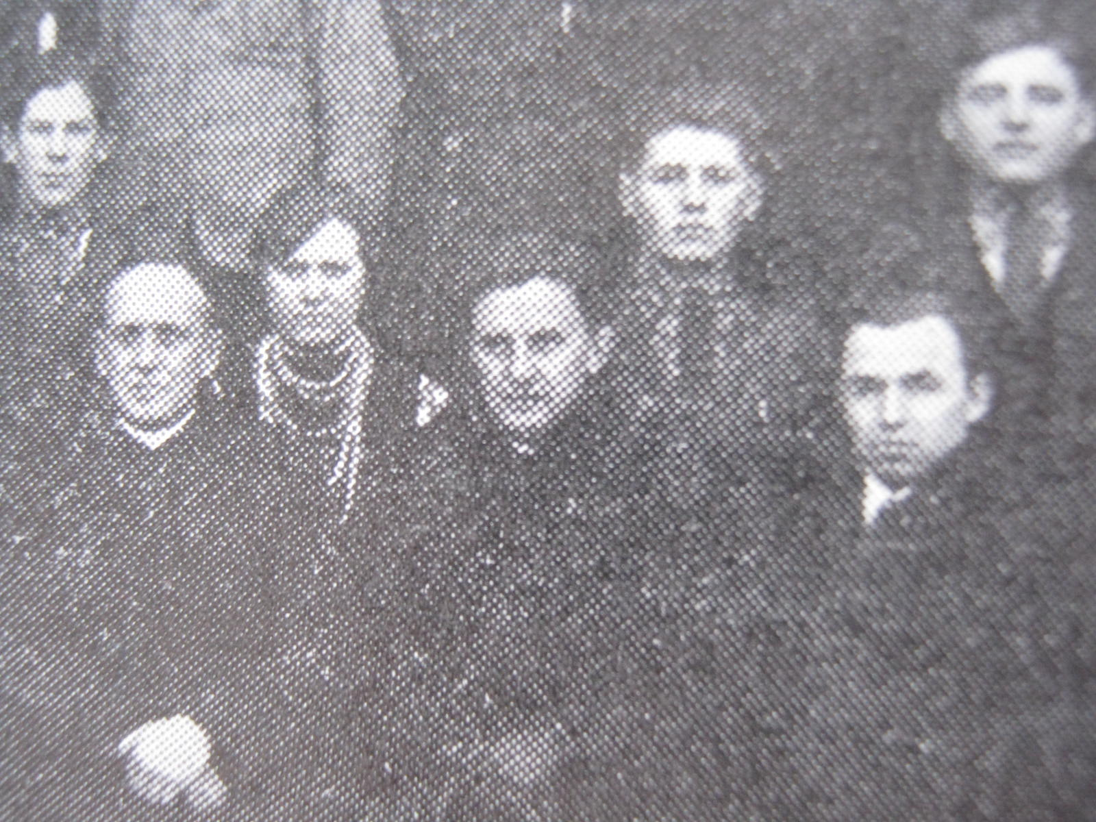 Юрій Шепарович (у центрі). Бучач.